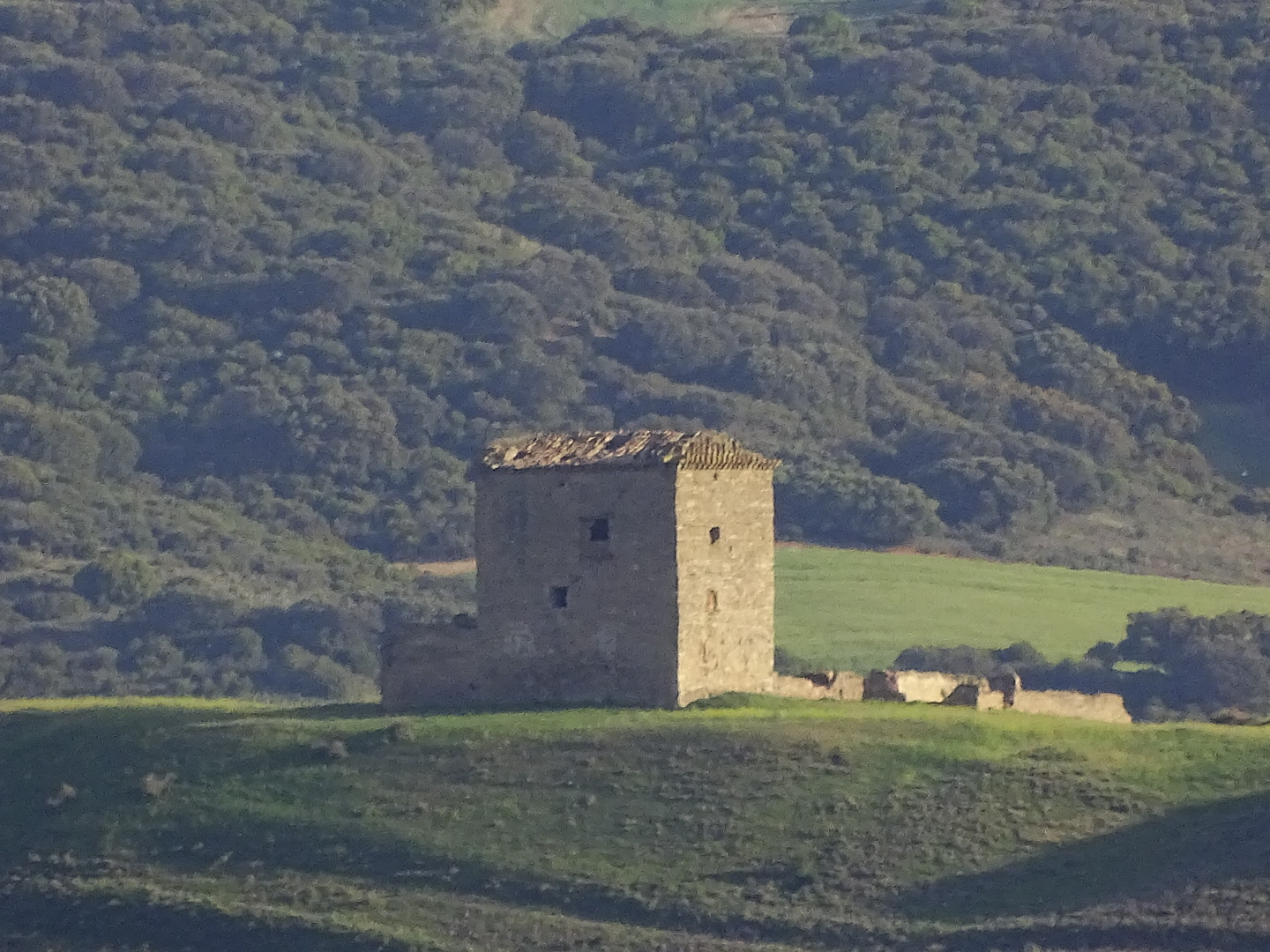 Torre de Sartaguda o de Rada